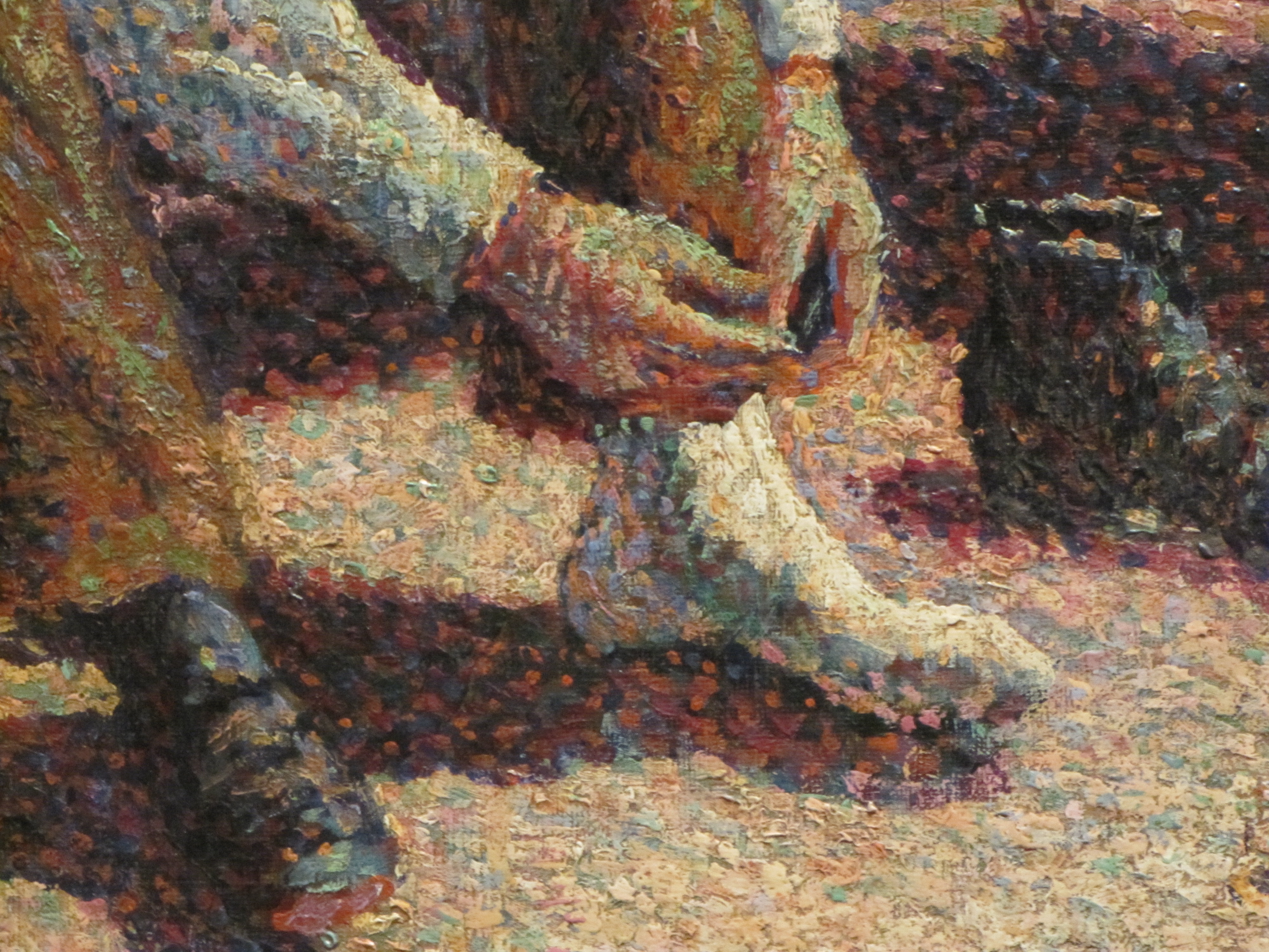 Détail de la toile de Maximilien Luce, Morning, Intérieur : le pied. Style pointilliste. Photo prise au Metropolitan museum de New York (2017).